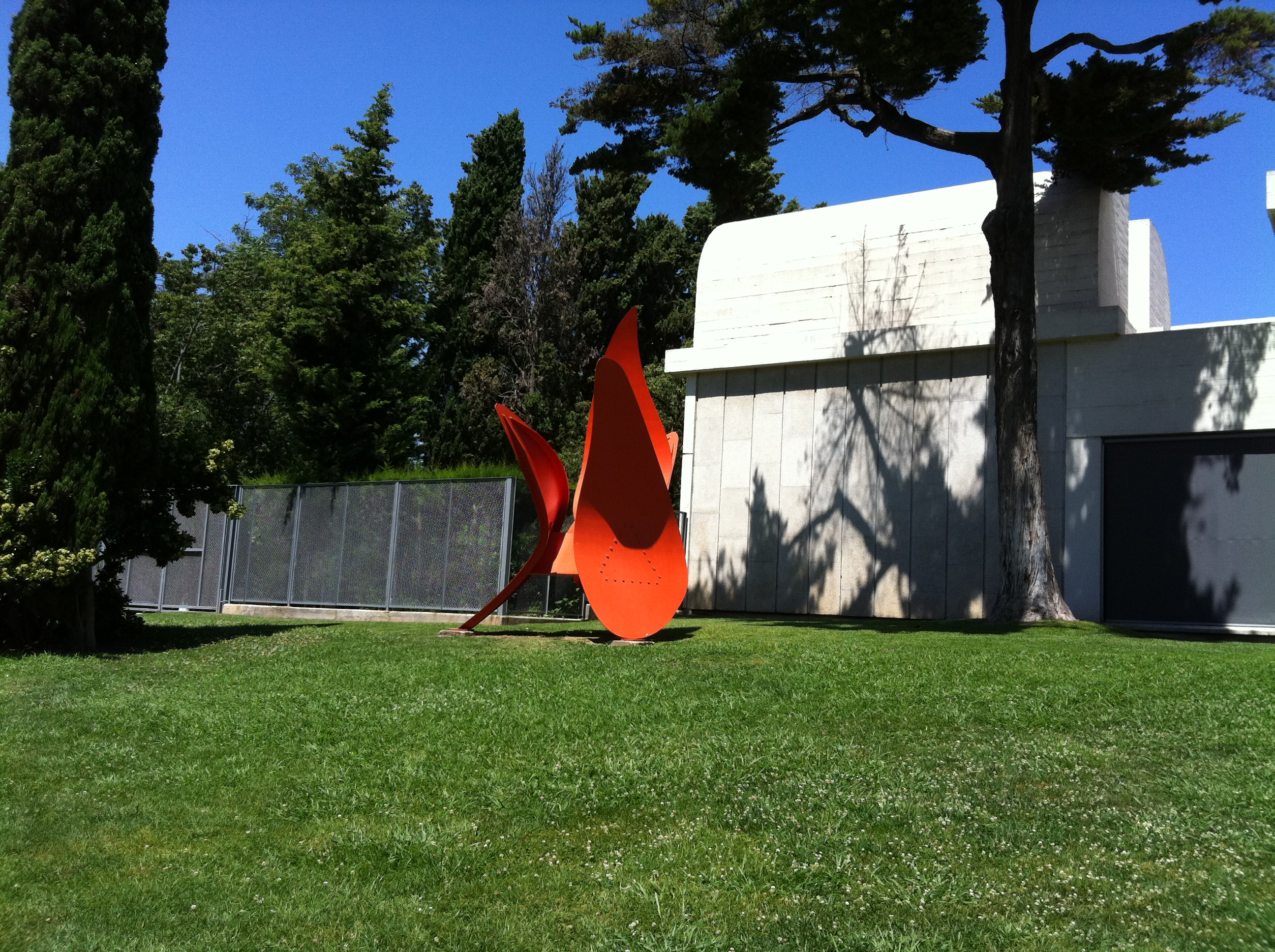 Fundació Joan Miró exterior views Alexander Calder - 4 wings- 1972